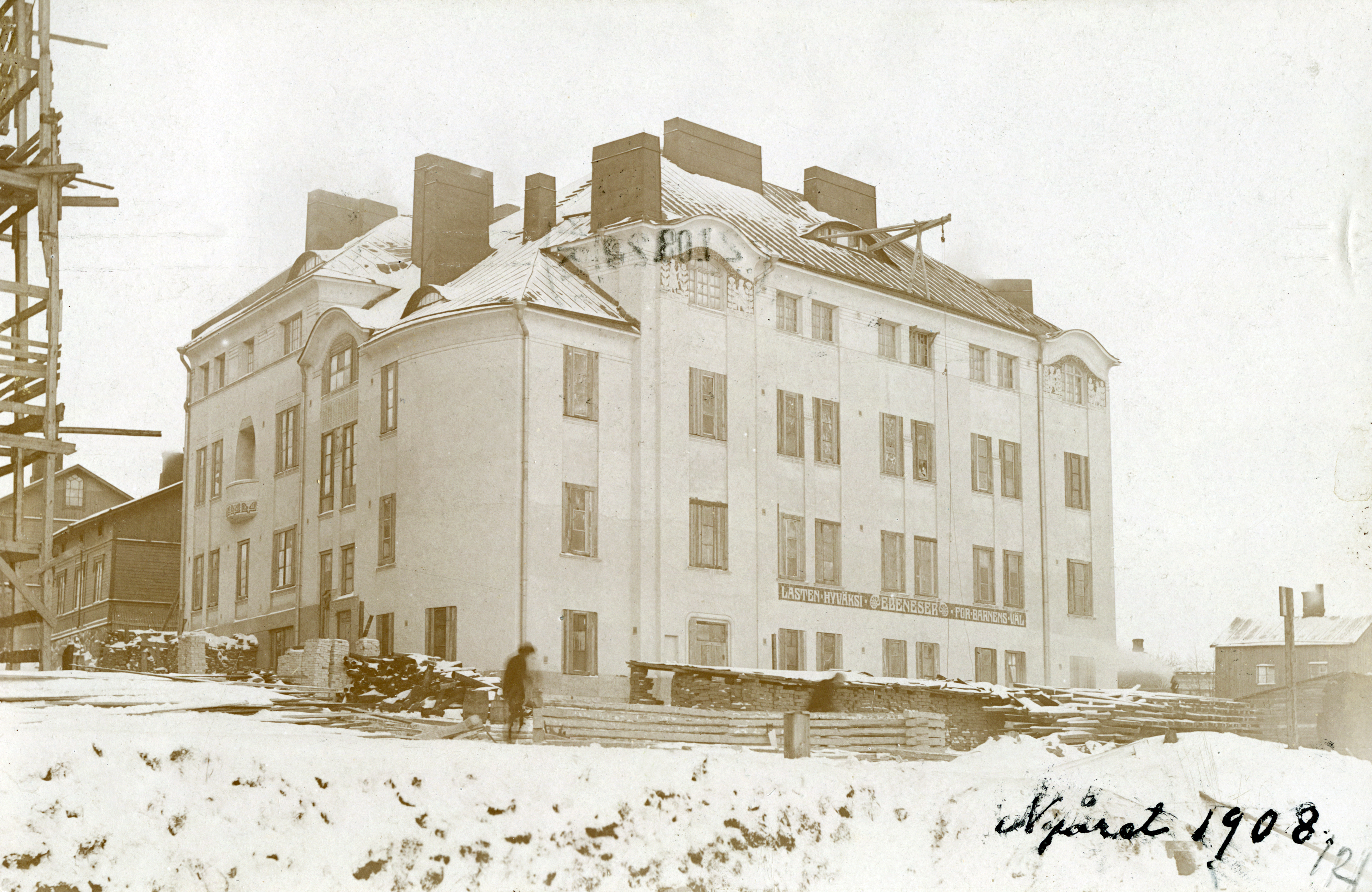 Ebeneser-talo (Helsinginkatu 3-5) valmistunut, uusivuosi 1908. Talon edessä rakennustarvikkeita. Vasemmalla olevan talon edessä rakennustelineitä (Helsinginkatu 7, valm. 1908). Vedos lähetetty postikorttina Hanna Rothmanille.